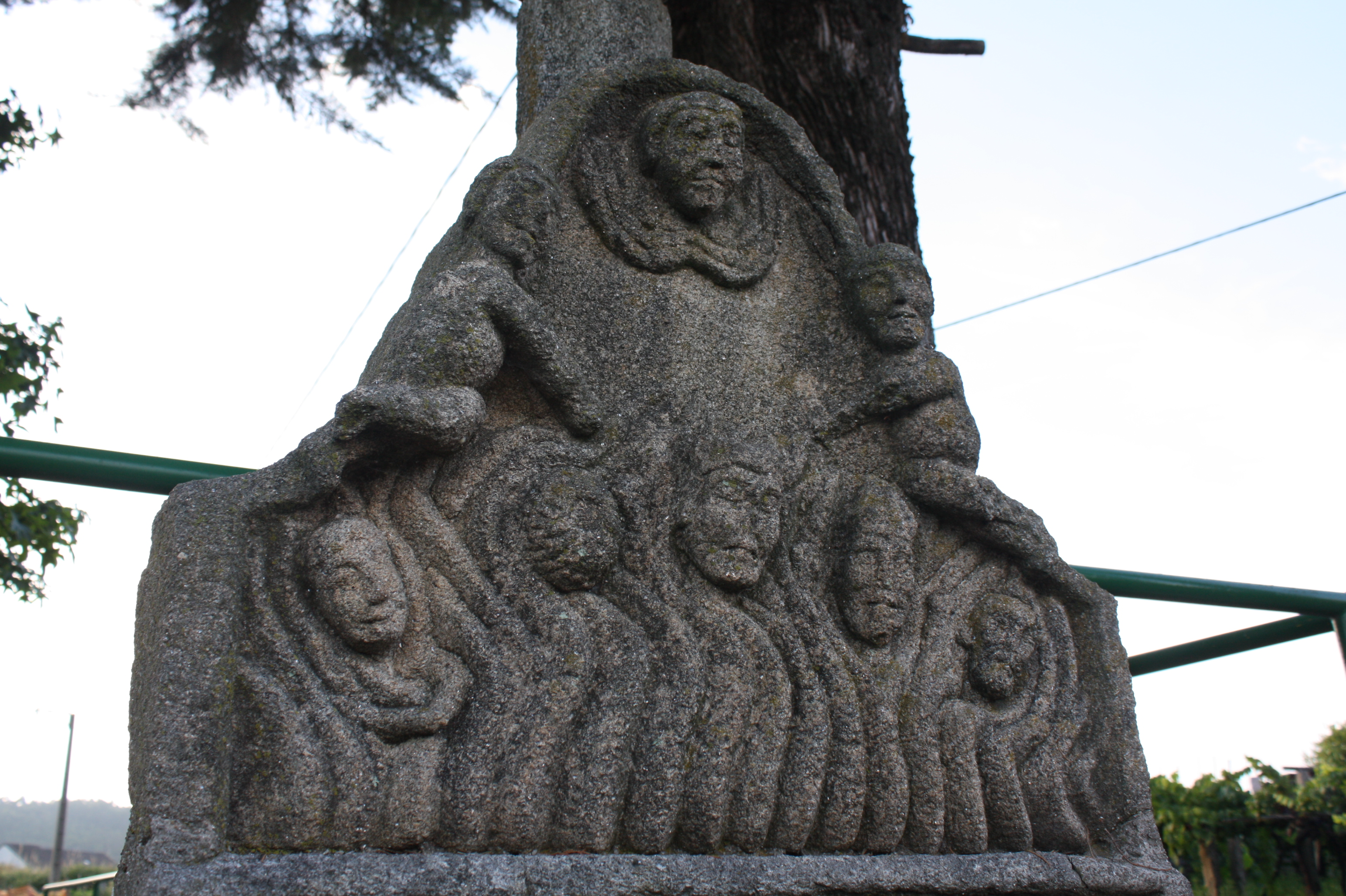 Panel do Purgatorio no peto de ánimas do Toural, na parroquia de Vilaboa, concello de Vilaboa (Pontevedra)